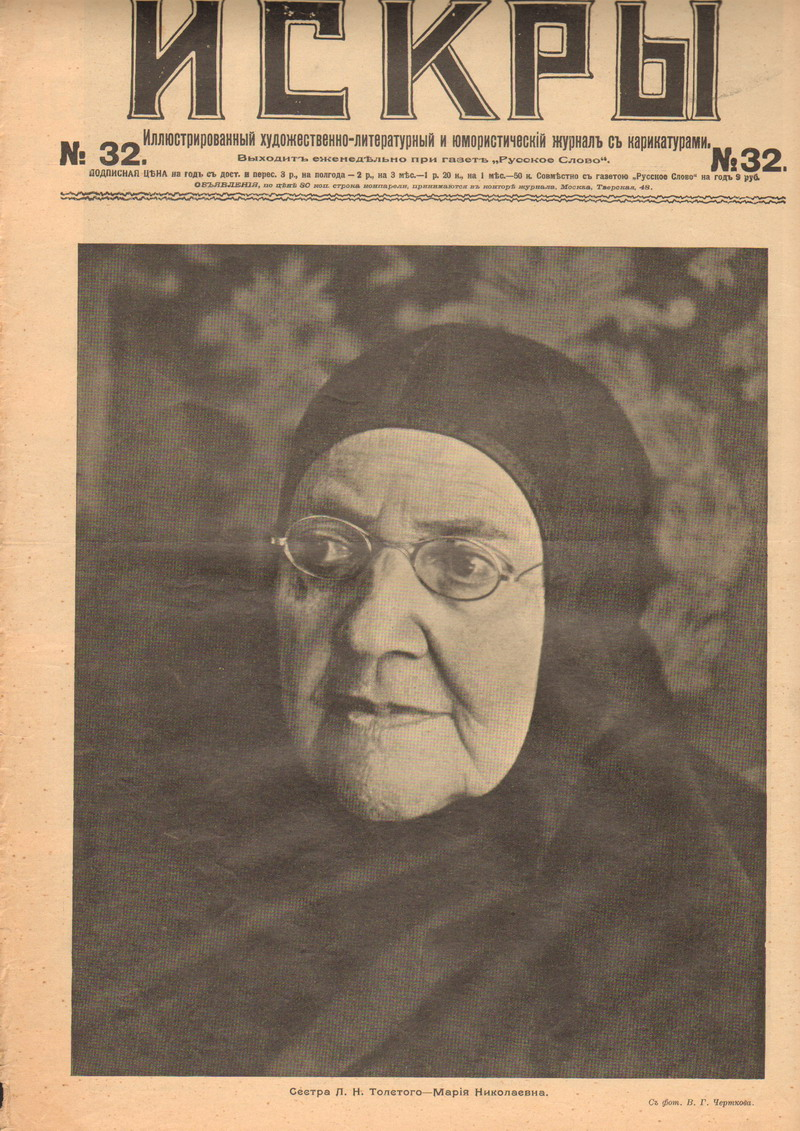 Иллюстрированный художественно-литературный и юмористический журнал с карикатурами «Искры».